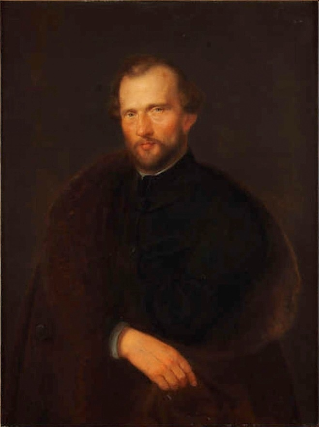 Portrait of Mikołaj Zyblikiewicz